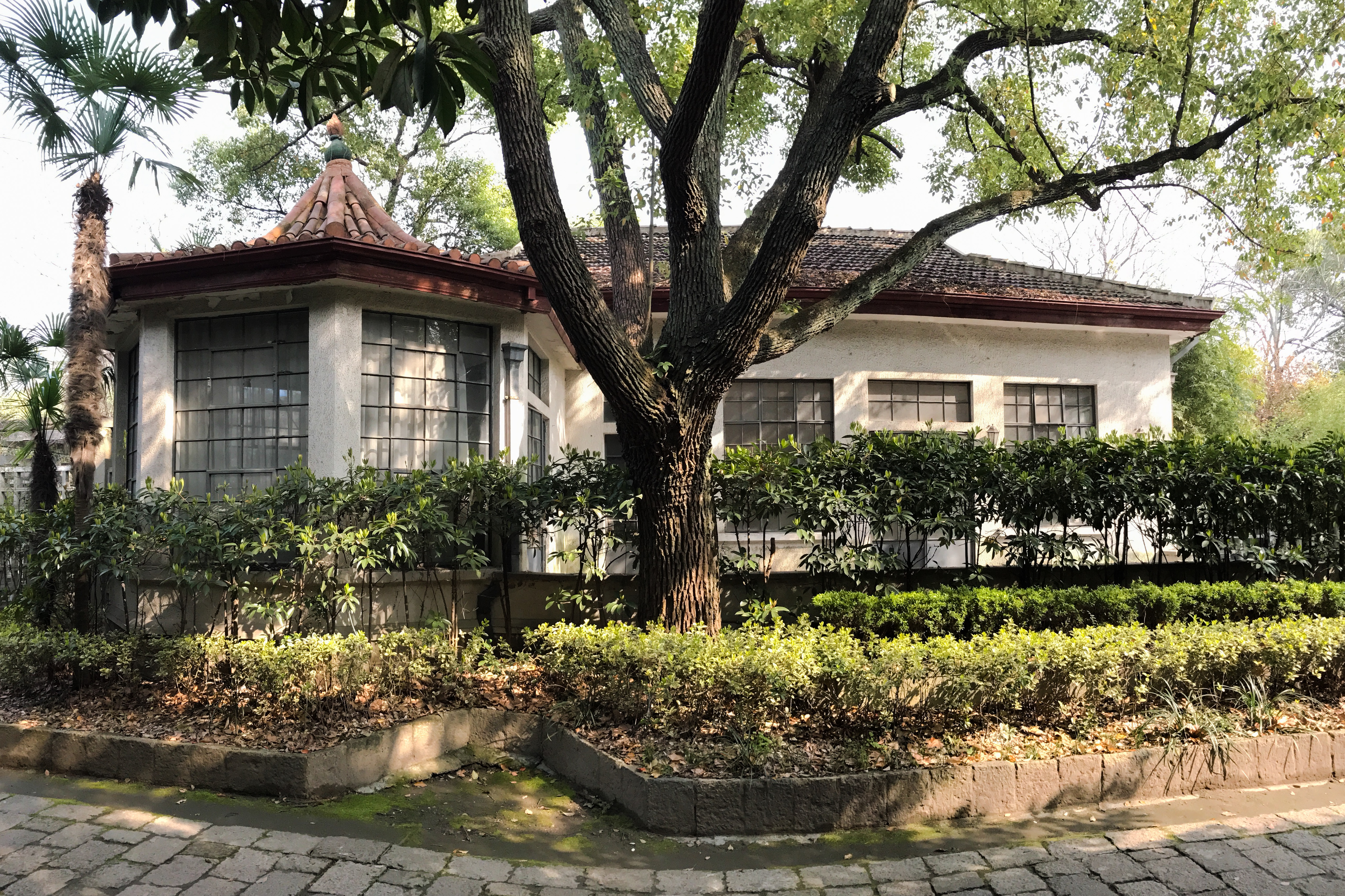 浚浦局职员俱乐部旧址 共青路386号